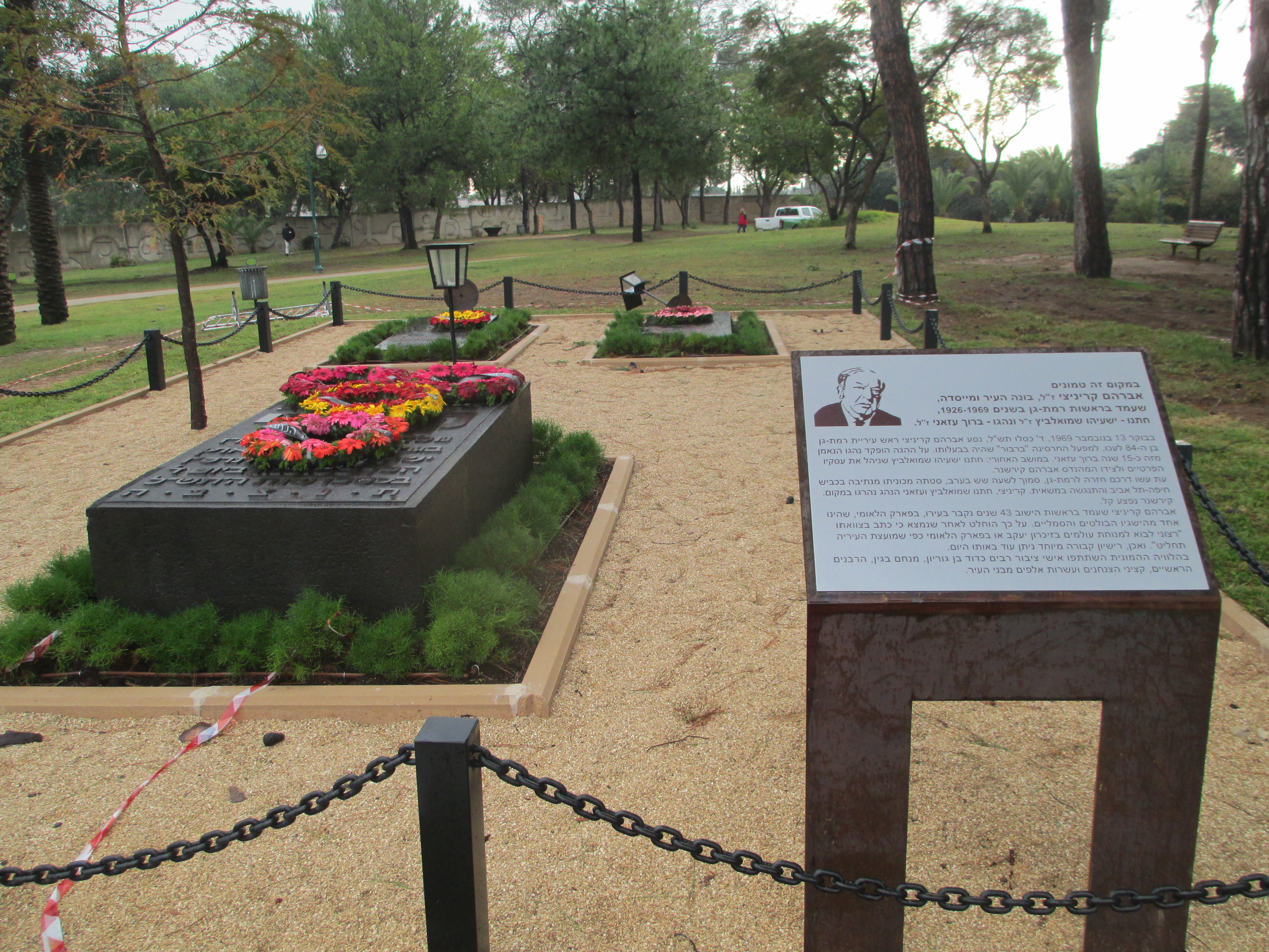 חלקת הקבר של אברהם קריניצי, נהגו וחתנו, בפארק הלאומי ברמת גן